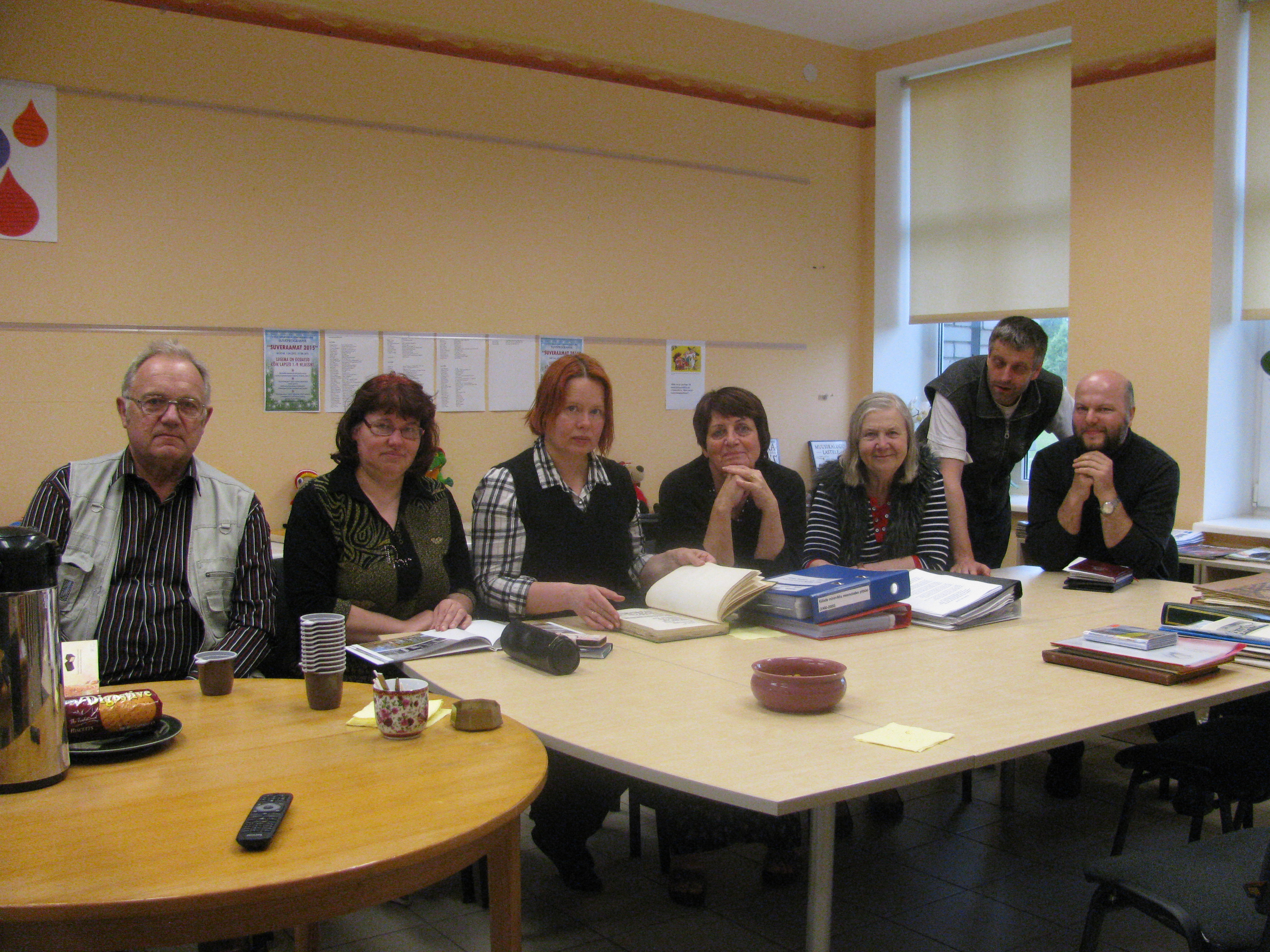 Vigala Vikipeedia töötuba 2. juunil 2015